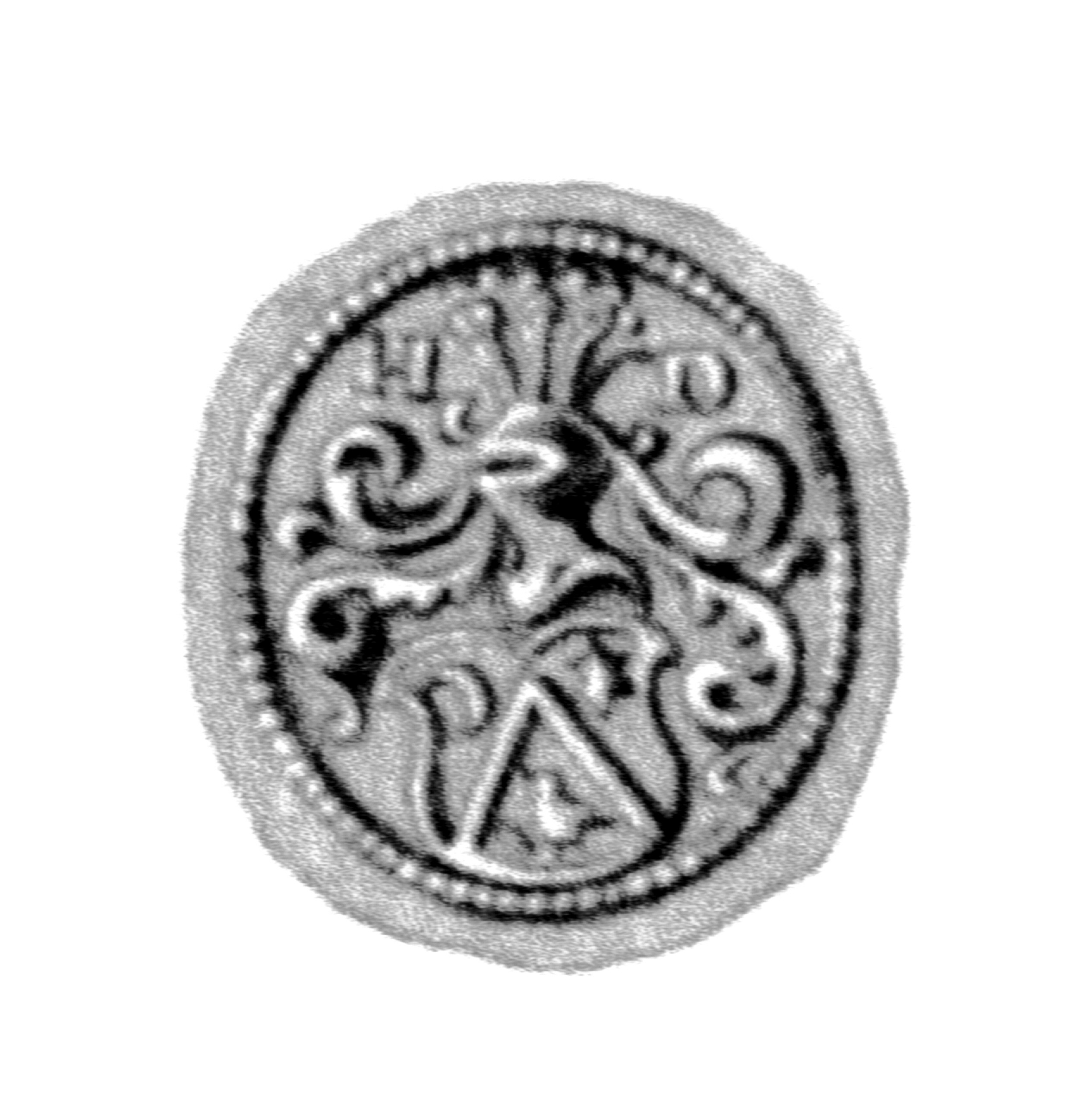 Siegel des Ratsmannes Hermen von Dorne. Das Siegel stammt aus der Zeit um 1504(?). Siehe Emil Ferdinand Fehling: Lübeckische Ratslinie, Nr. 647 (Hermann von Dorne d. 1559), ist der früheste Ratsherr (1535); Fehling führt bei ihm kein Siegel an.